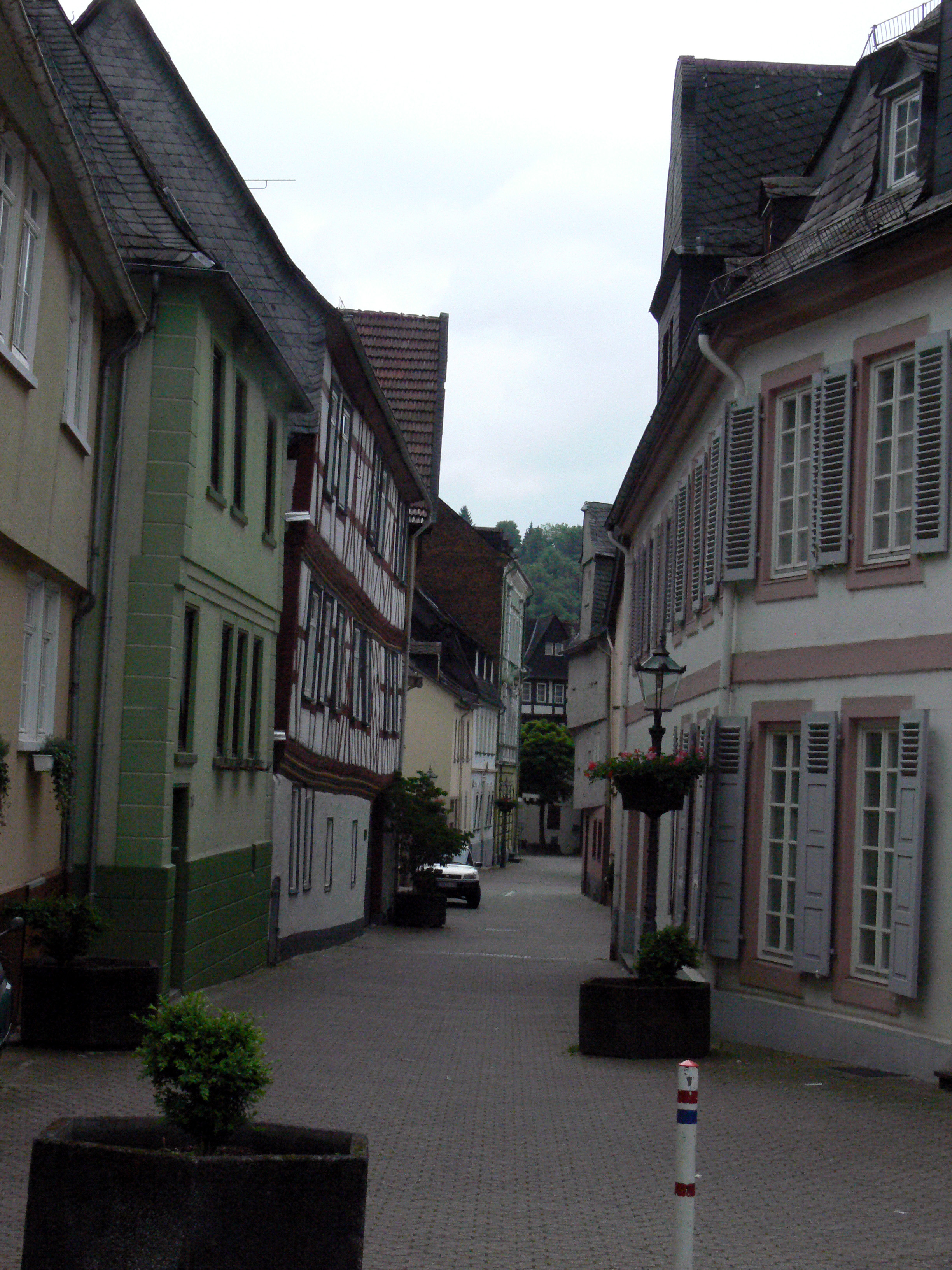 Pfaffengasse in Diez